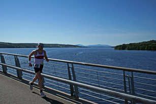 Utsikt från Östersund Marathons bana